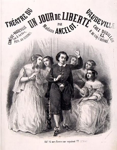 Théâtre du Vaudeville. Un Jour de liberté par Madame Ancelot : affiche